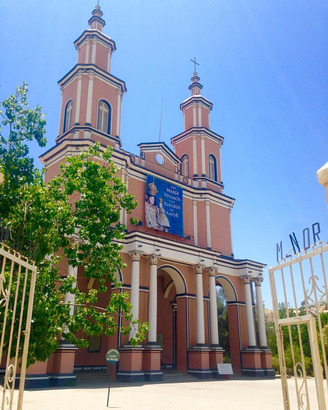 Iglesia grande de Andacollo (2017)